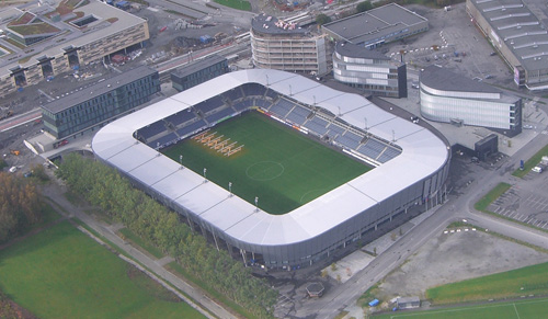 Viking stadion in Stavanger, Norway